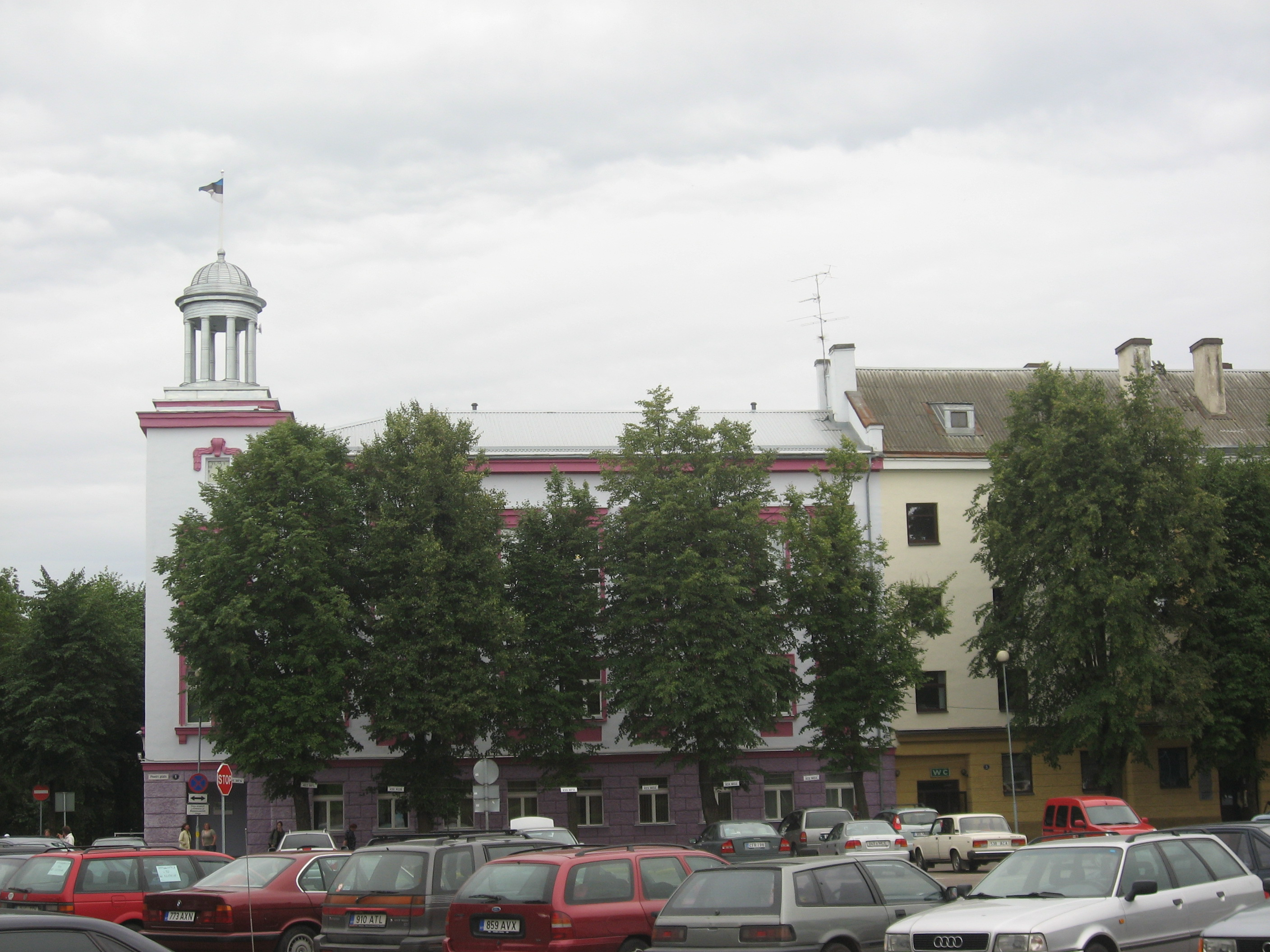 Narva